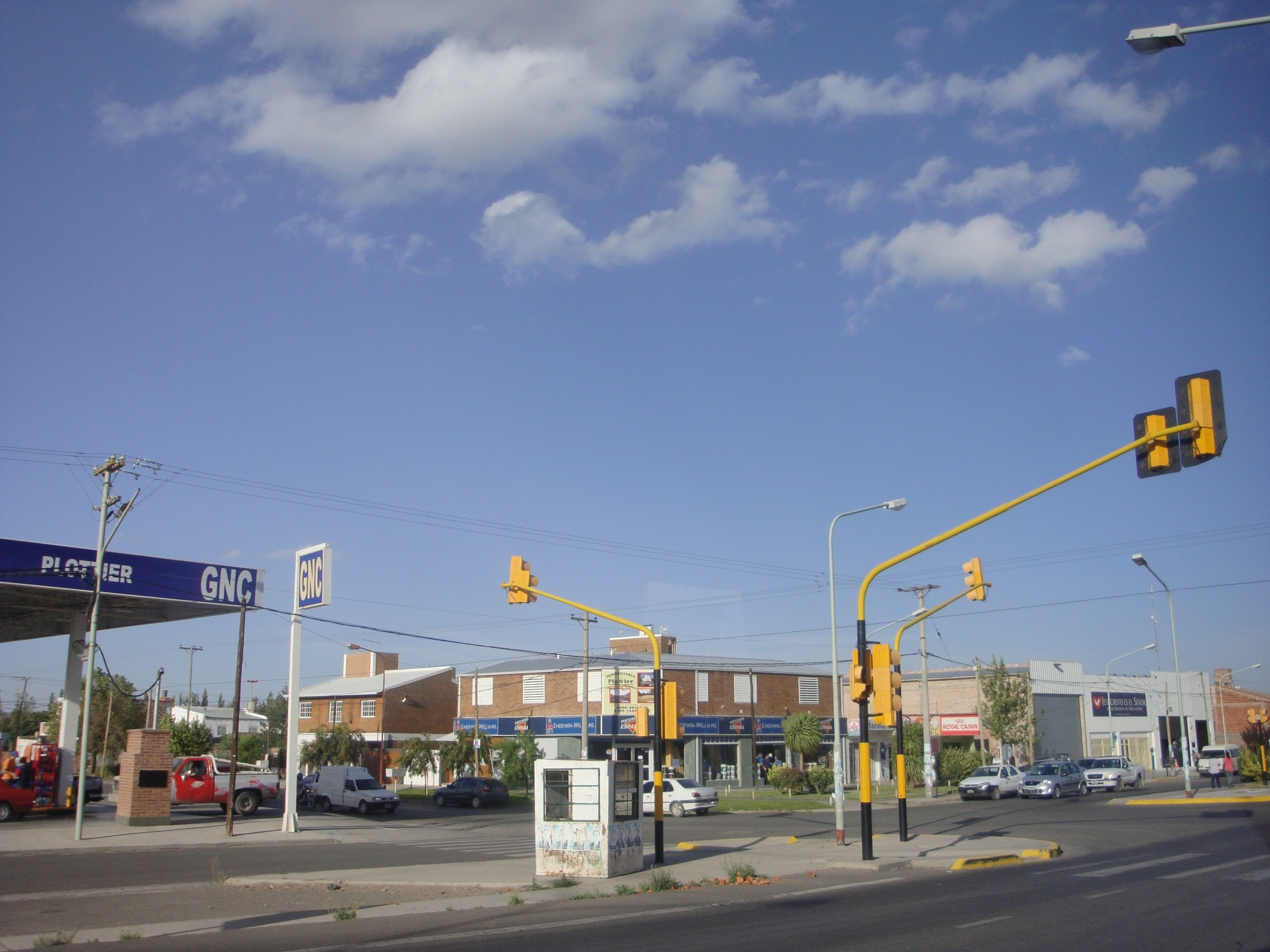 Esquina de Plottier, Provincia del Neuquén, Argentina.